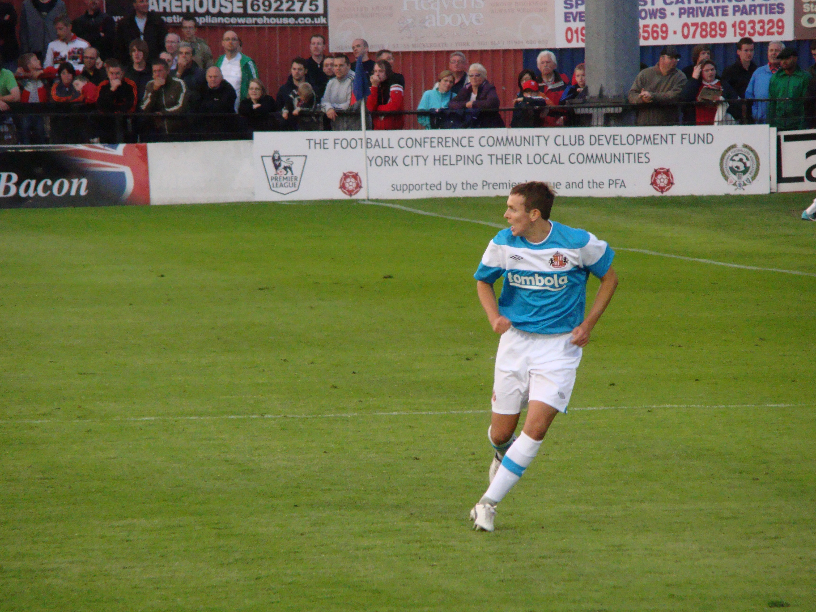 YCFC vs SAFC